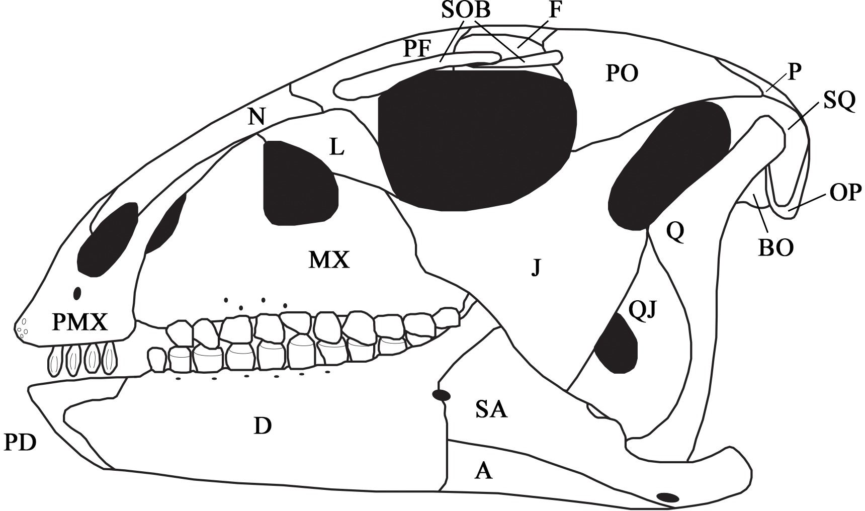 Skull reconstruction. Skull reconstruction of C. marri based on available specimens. Abbreviations: A-articular, BO-basioccipital, D-dentary, F-frontal, J-jugal, L-lacrimal, MX-maxilla, N-nasal, OP-opisthotic, P-parietal, PD-predentary, PF-prefrontal, PMX-premaxilla, PO-postorbital, Q-quadrate, QJ-quadratojugal, SA-surangular, SOB-supraorbital, SQ-squamosal.